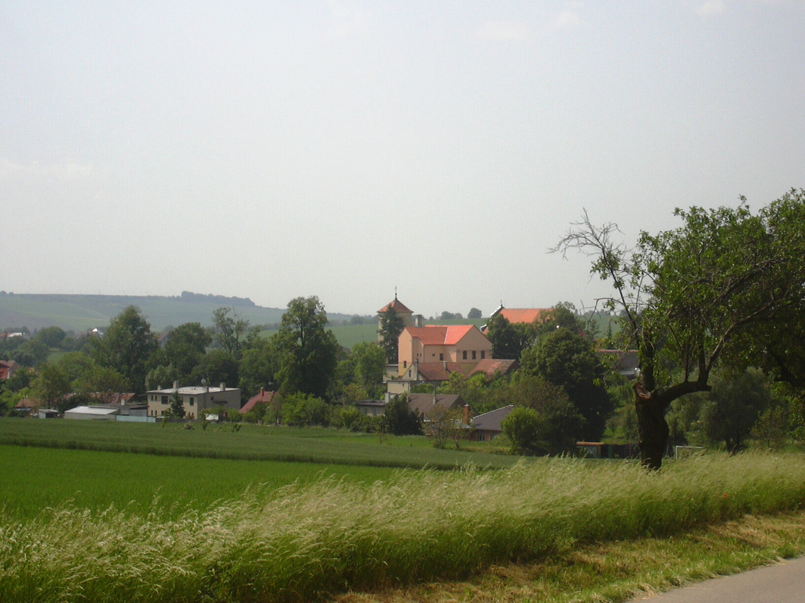 Královopolské Vážany (Rousínov- czech republic)